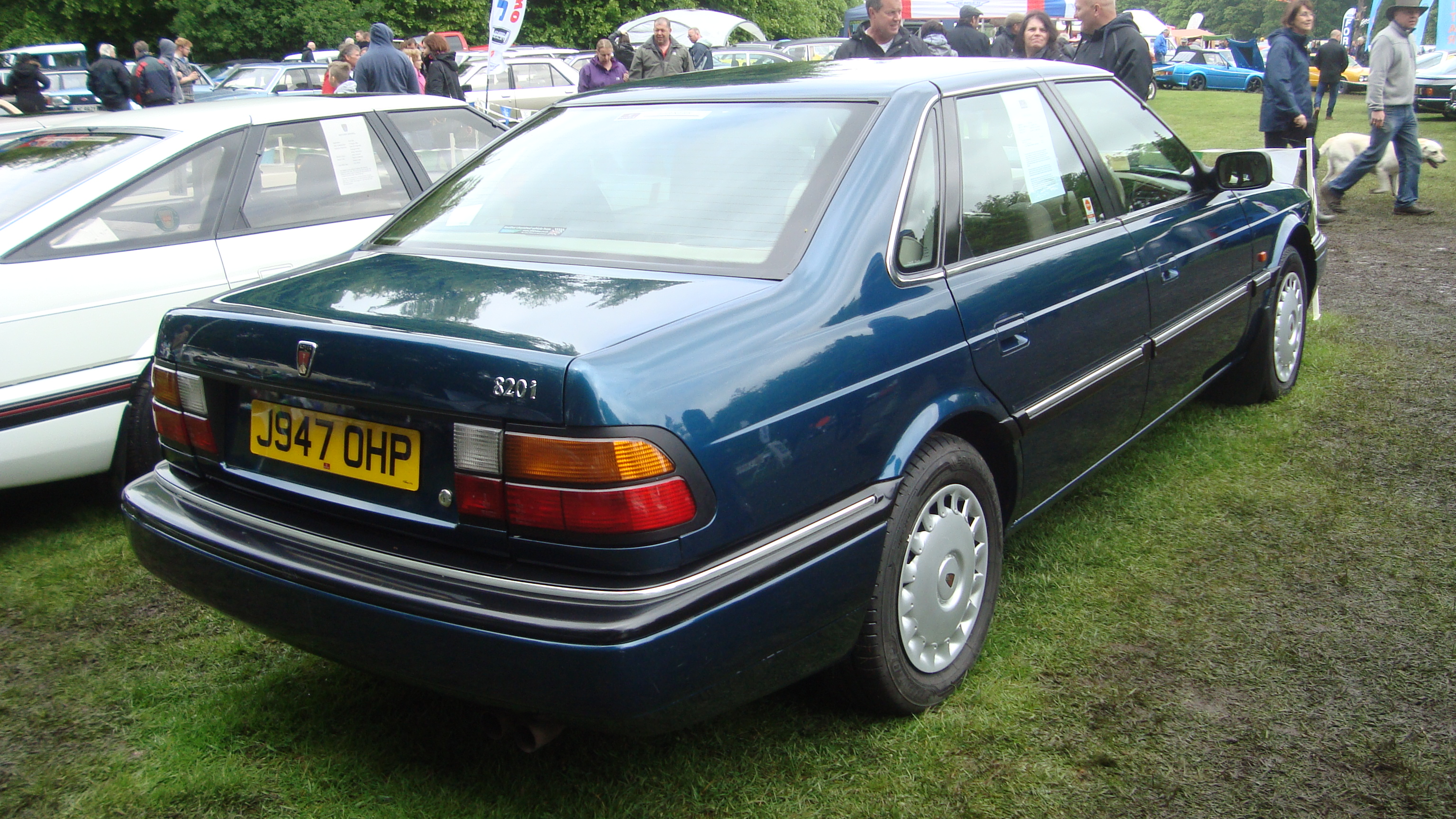 1991 Rover 820i Saloon